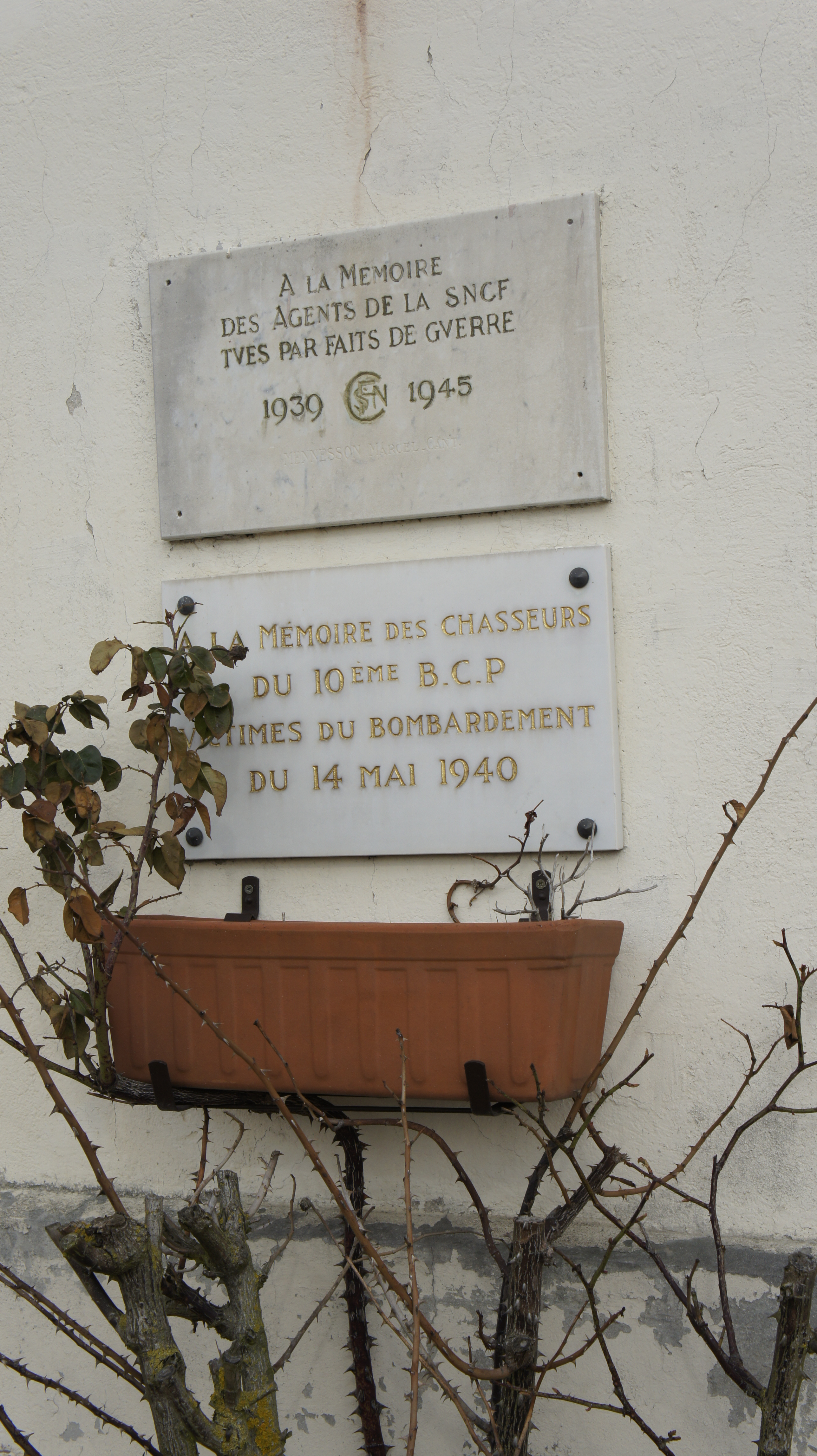 Monument aux morts de la S.N.C.F et du 10 B.C.P en la Gare de Guignicourt .